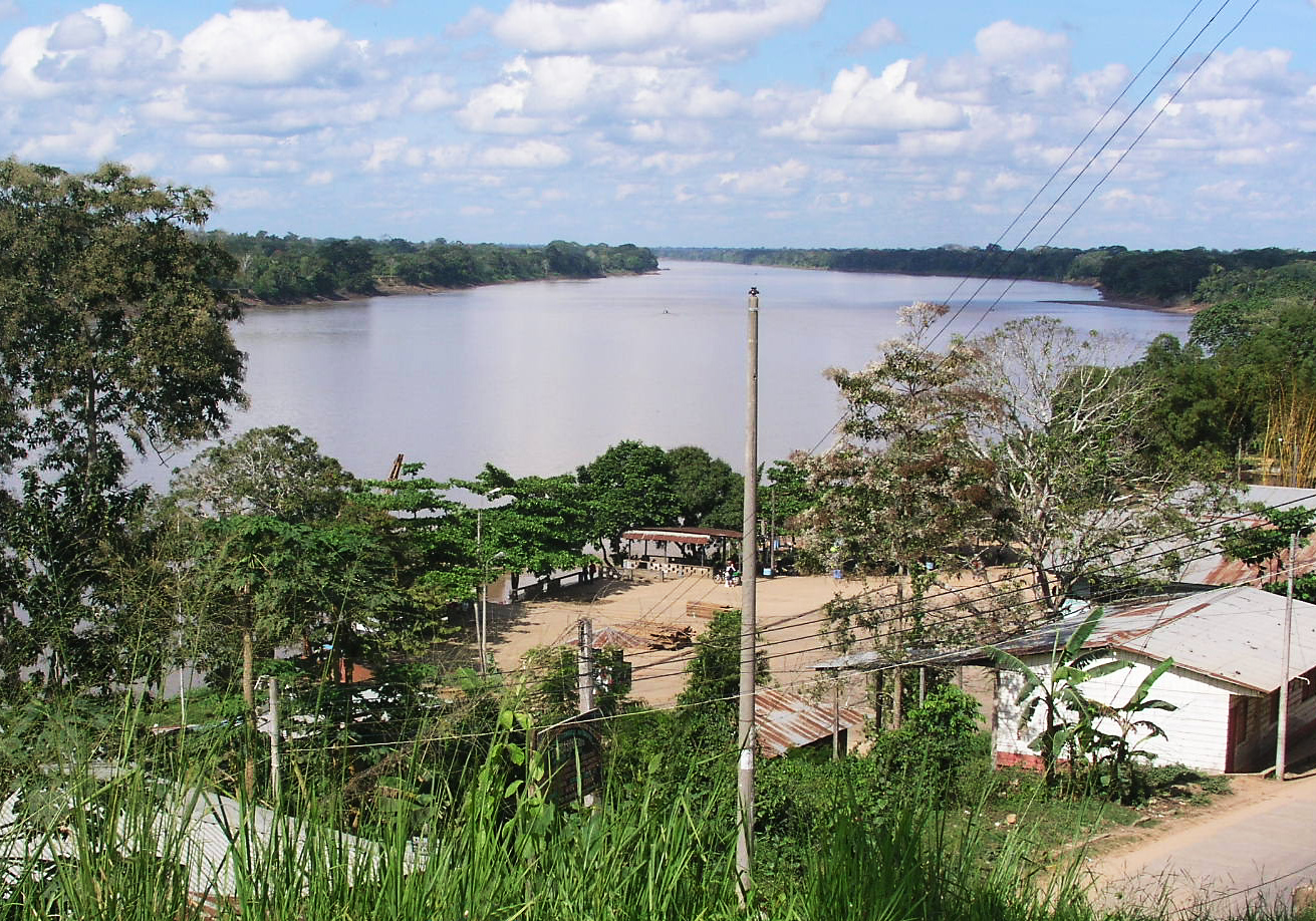 Rio Madre de Dios, seen at the port, Puerto Maldonado, Peru